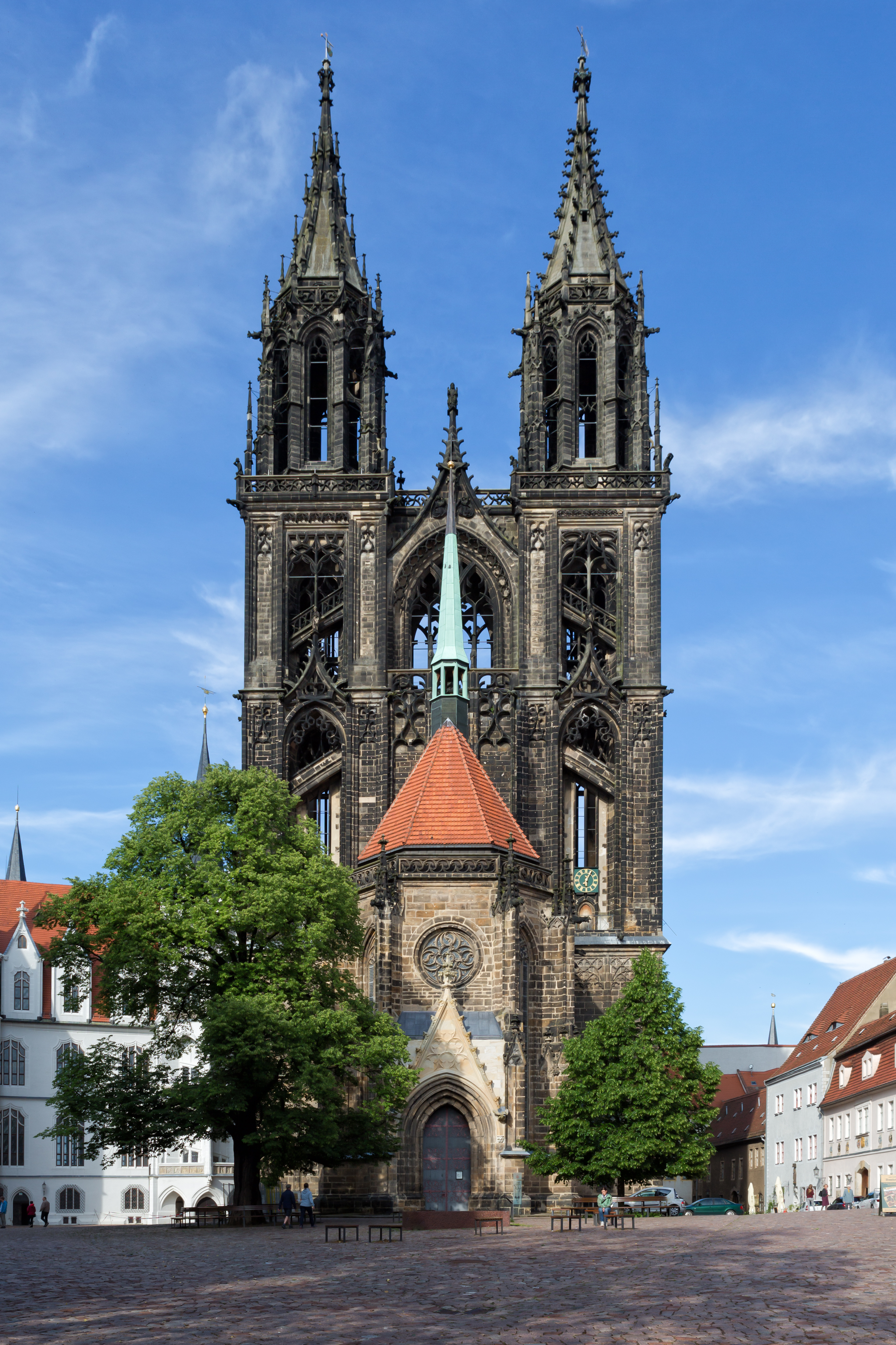 Frontansicht des Meißner Doms, 2017.